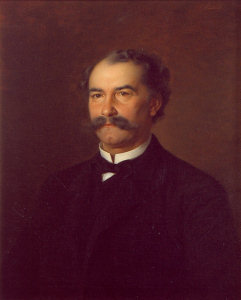 Peter Franz Bibus